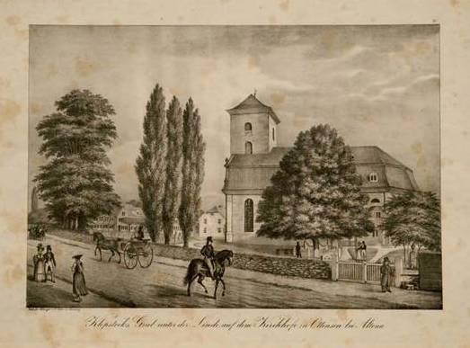 Lithographie um 1840. Maße: Papier: H: 32,7 cm, B: 40,8 cm, Bild: H: 22,4 cm, B: 32,3 cm.